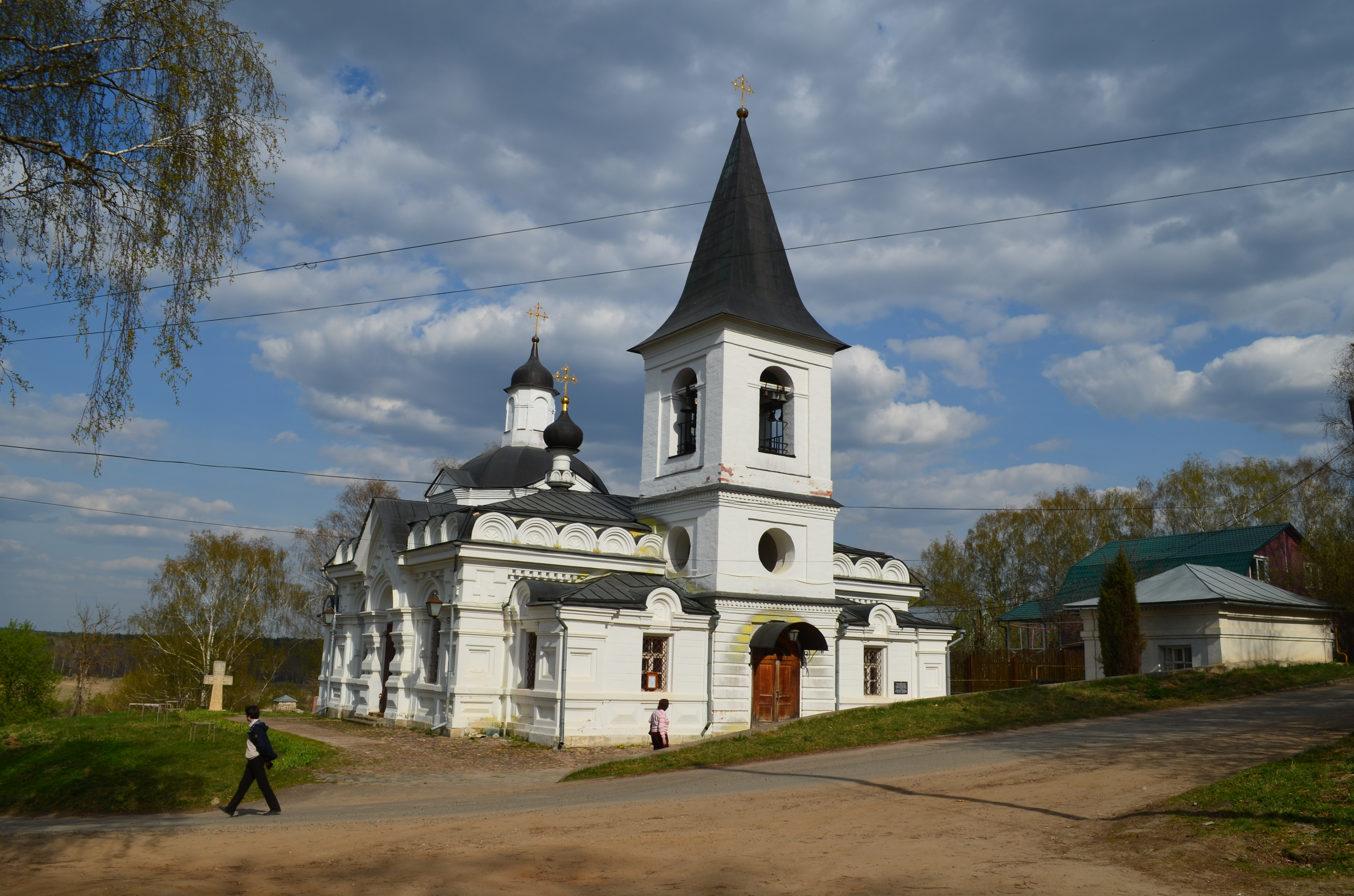 Таруса.Храм Воскресения Христова на Воскресенской горке.17 век.